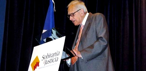 Acte d'homenatge al filòleg i Premi d'Honor de les Lletres Catalanes, Antoni M. Badia i Margarit, President d'Honor de Sobirania i Justícia. Celebrat a l'Ateneu Barcelonès el 27 de novembre de 2009